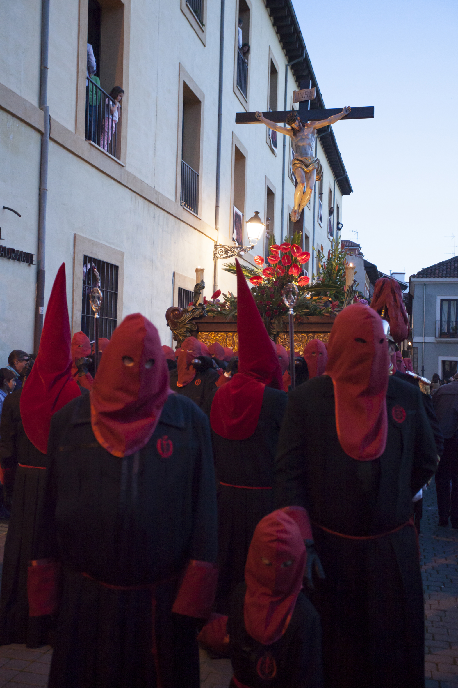 Semana Santa en León, España. Abril 2014. This is a photography of a Folklore festival in Spain (Wikidata id Q9075874).